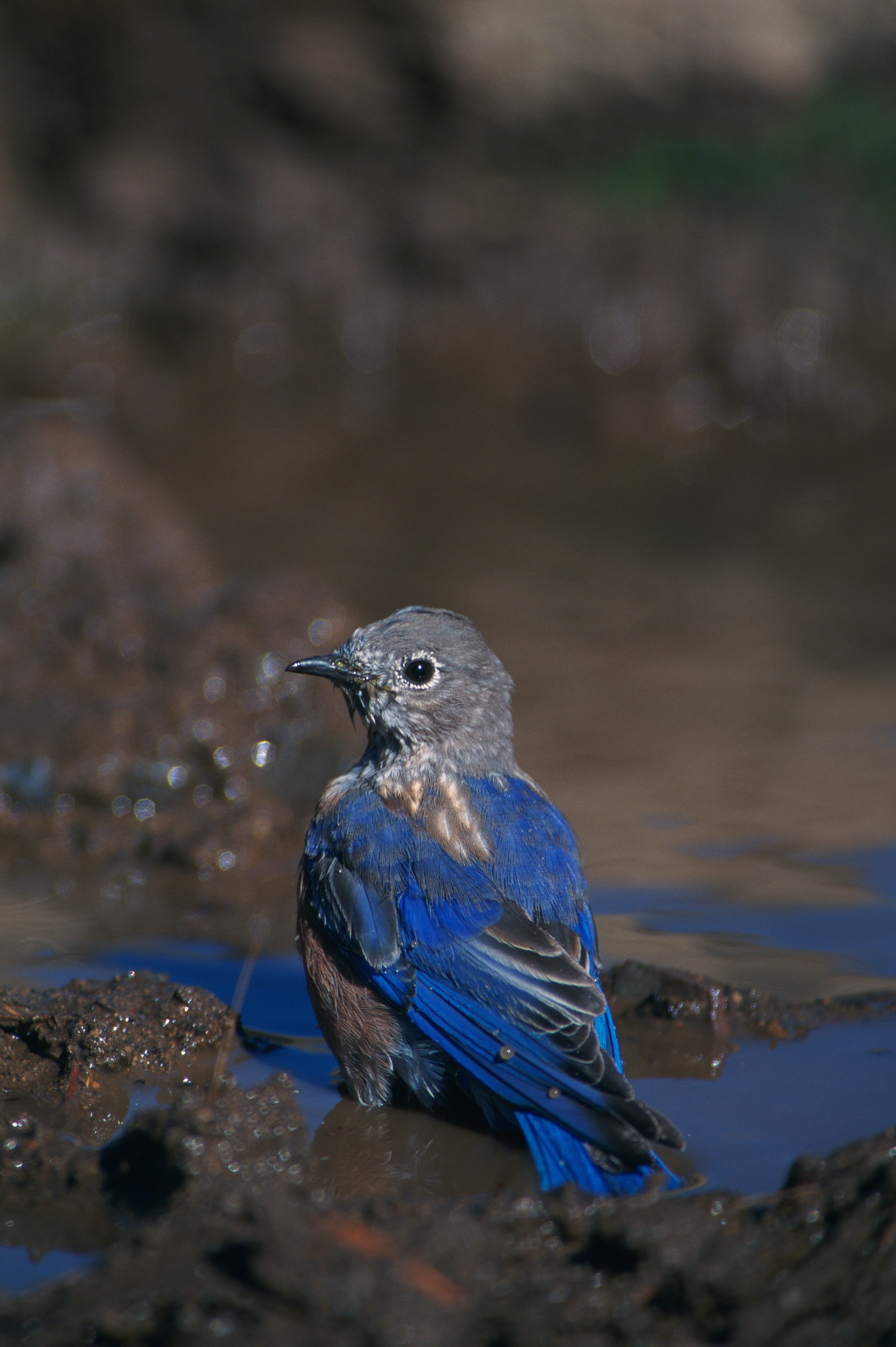 Western Bluebird, Juvenile, Arizona